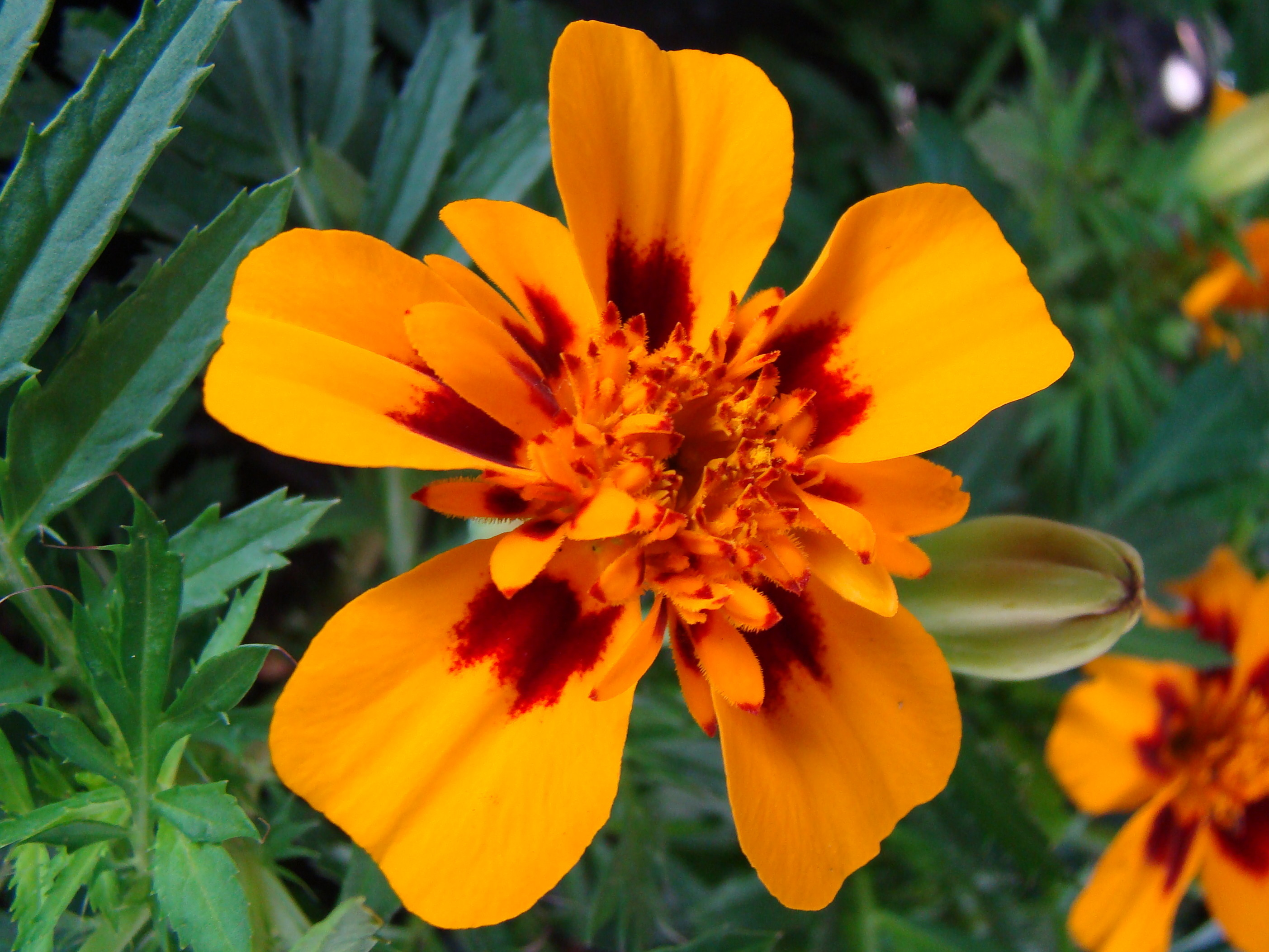 Tagetes